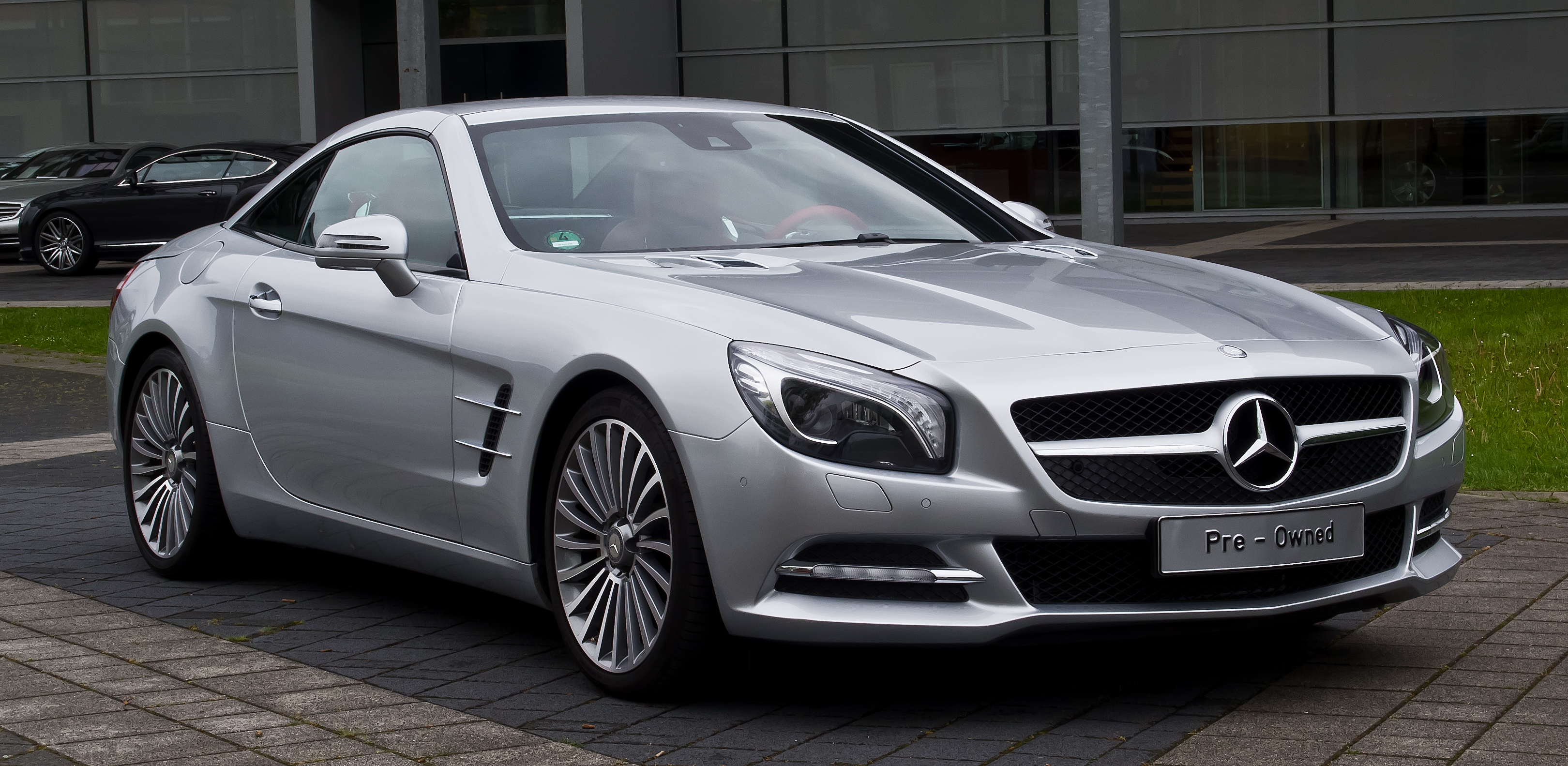 Mercedes-Benz SL 350 (R 231)